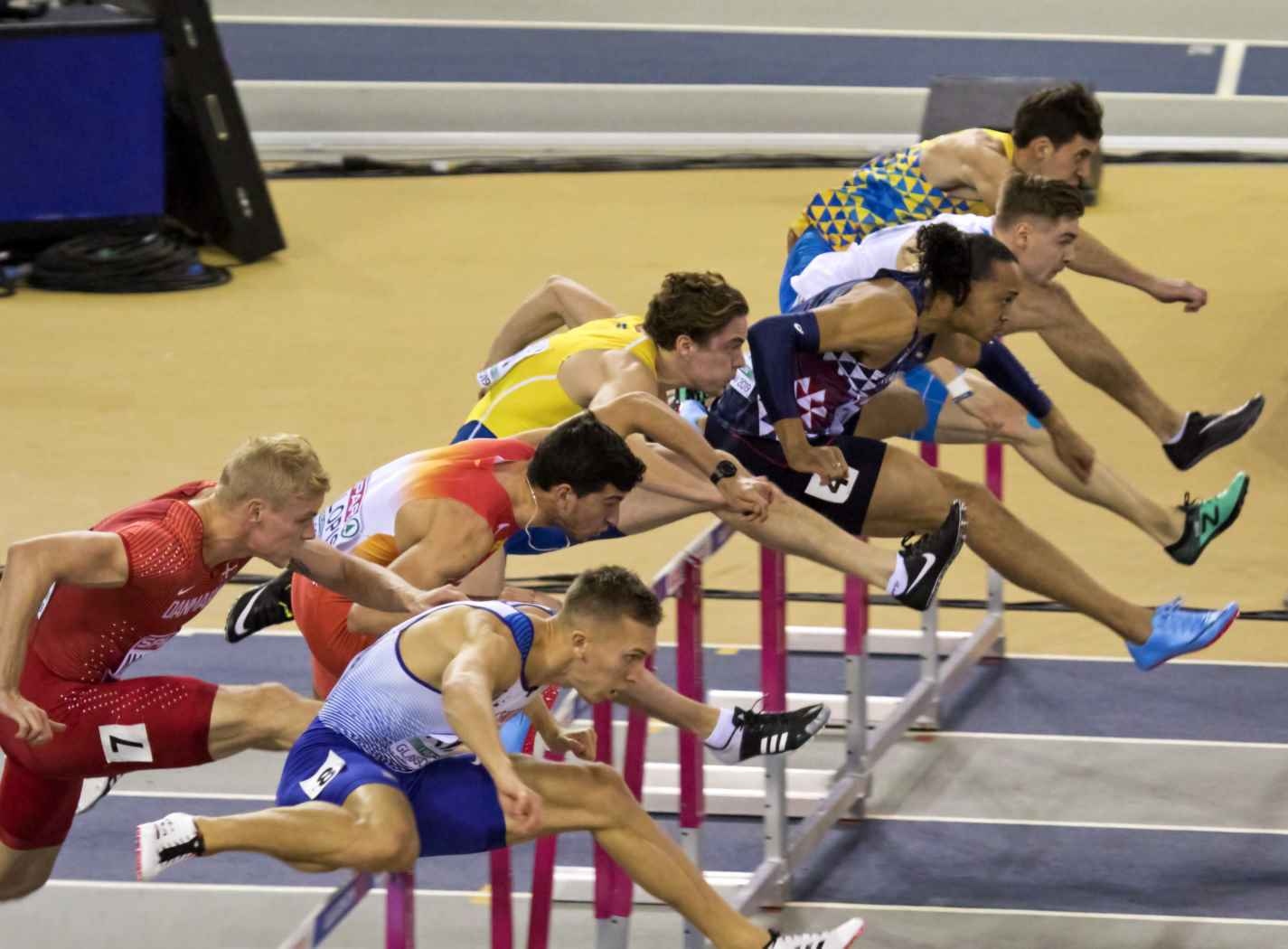 EKI20185 series 60mH martinot lagarde